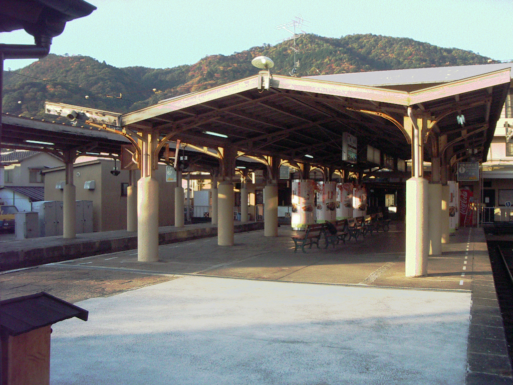 京福電鉄嵐山本線嵐山駅 2007年11月、投稿者が撮影